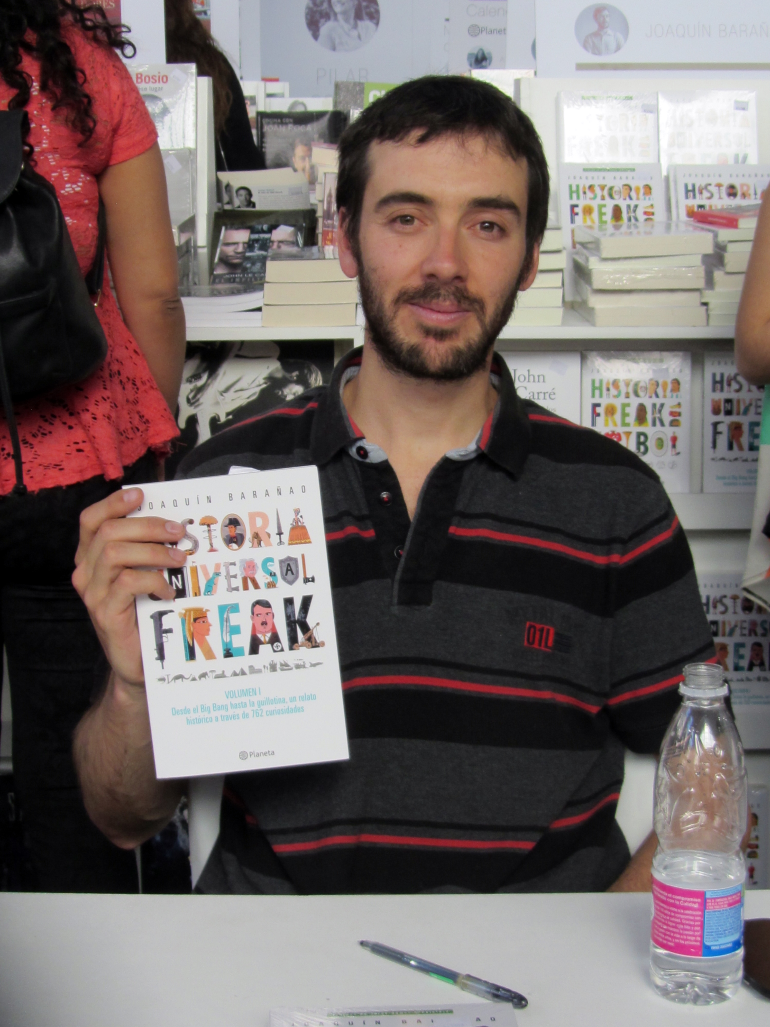 El escritor chileno Joaquín Barañao firma ejemplares de la Historia universal freak en el stand de la editorial Planeta en la Feria Internacional del Libro de Santiago 2016